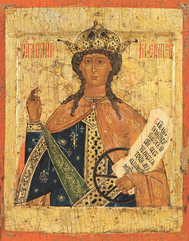 Русская икона святой великомученицы Екатерины Александрийской